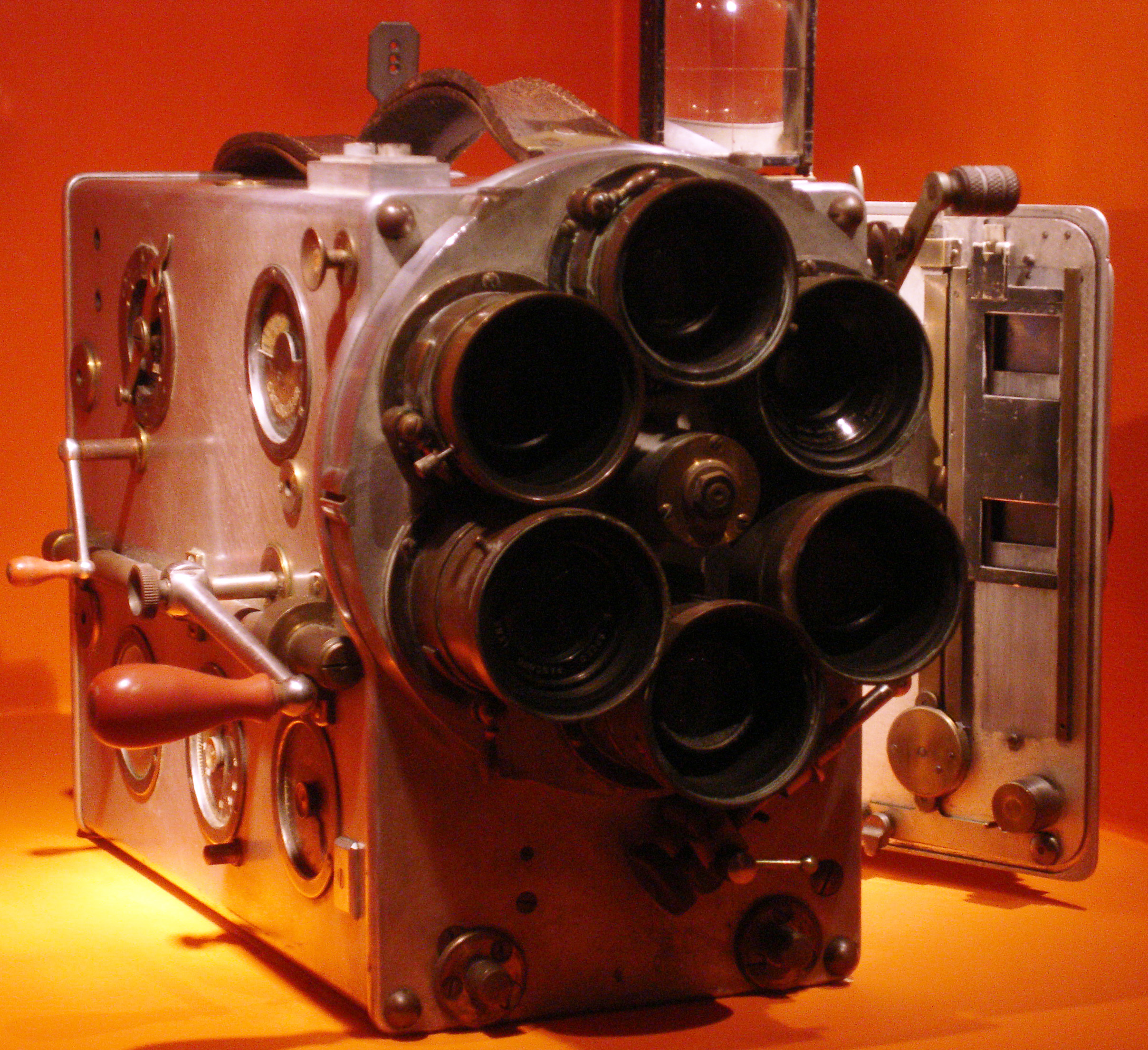 Caméra argentique 35 mm "Caméréclair", de la société française Éclair (1924).